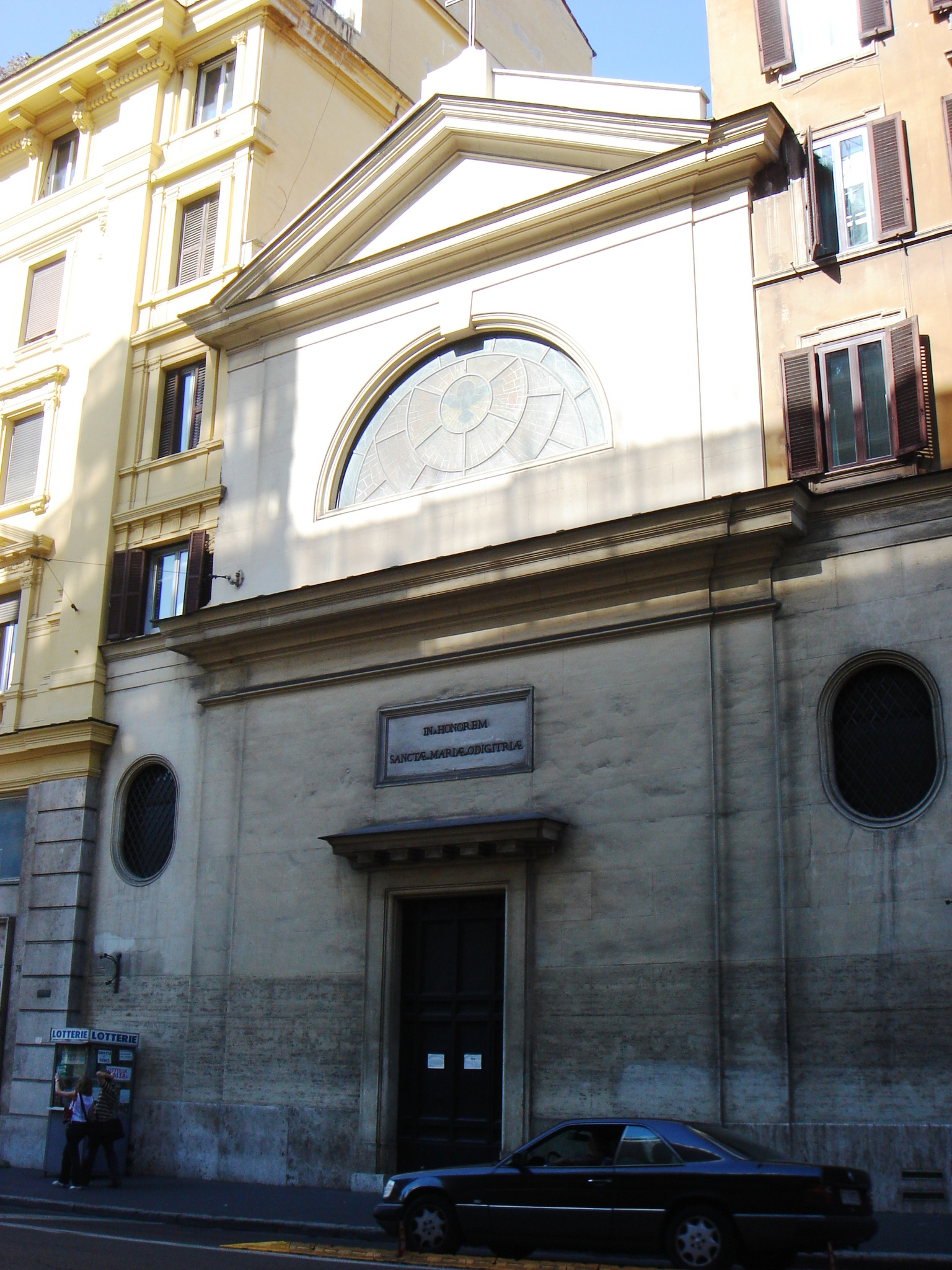 Roma, santa Maria Odigitria al Tritone